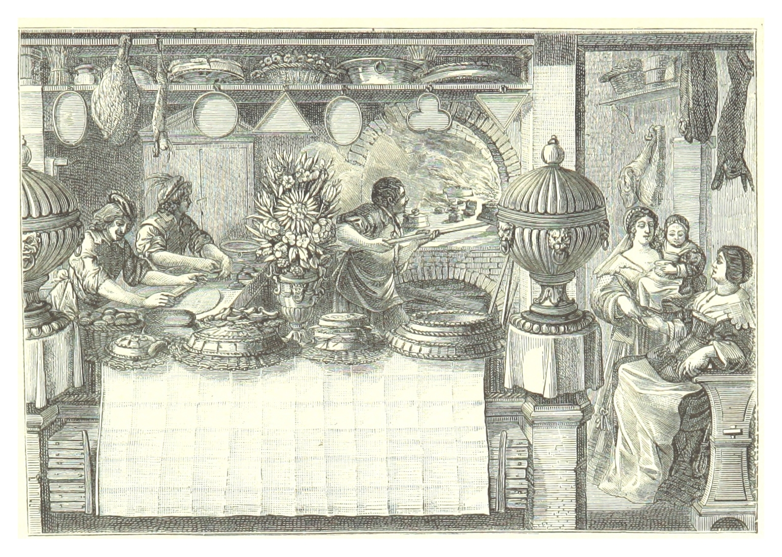 Vue intérieure d'une pâtisserie avec pâtissiers au travail, fourneau, comptoir de vente et clientes.